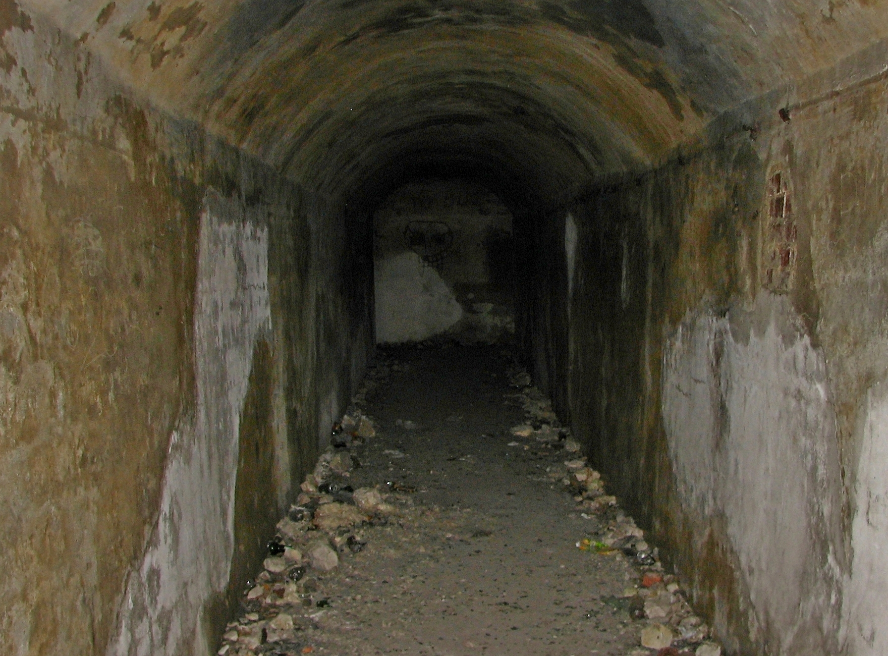 wnętrze kawerny Magazyn w uroczysku Skałki Twardowskiego w Krakowie, korytarz wejściowy